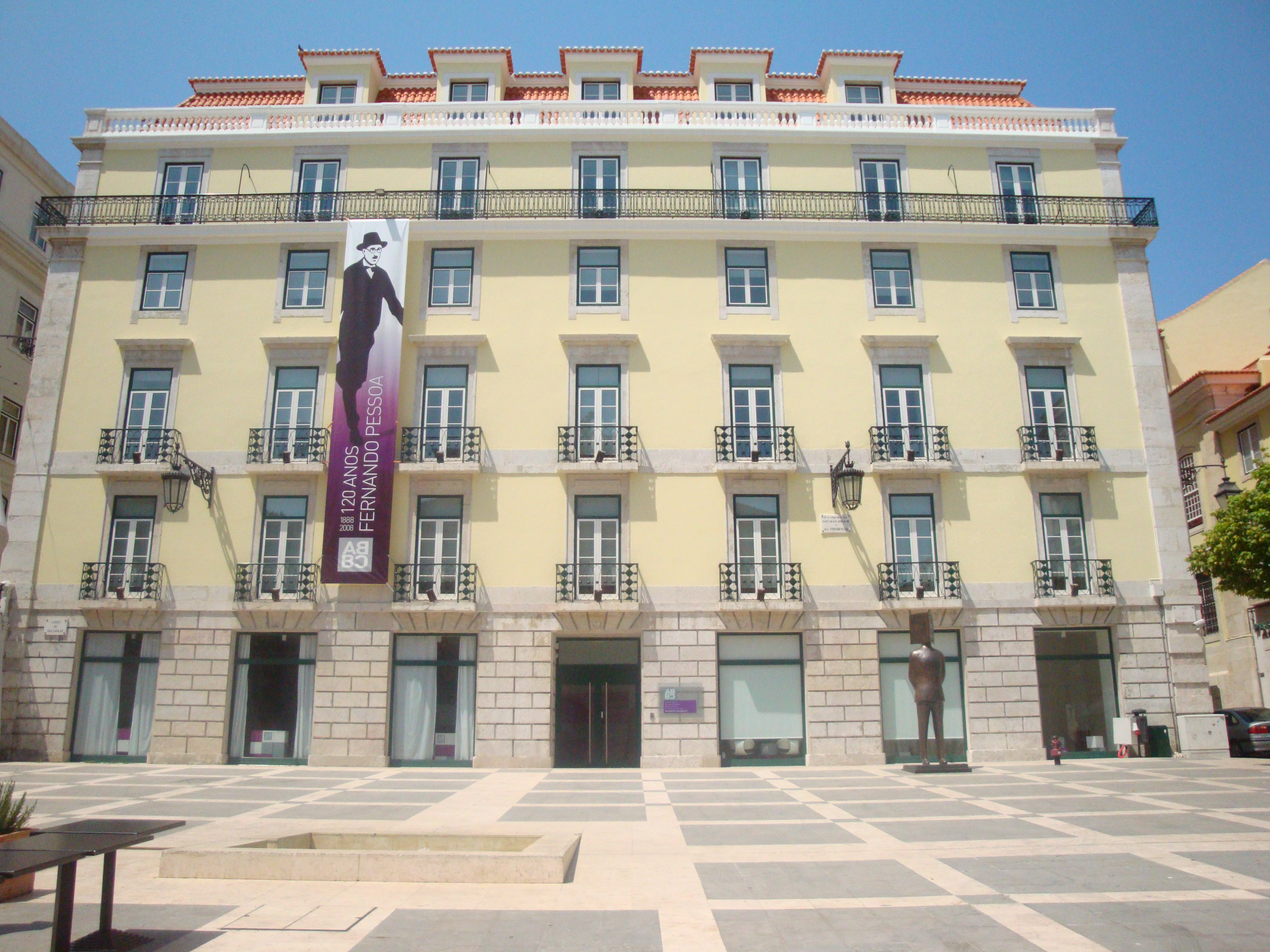 Casa onde nasceu Fernando Pessoa, no Largo de São Carlos em Lisboa